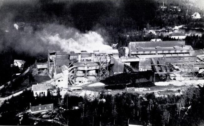 Meraker smelteverk, eid av Union Carbide Corporation, i Kopperå i Meråker.